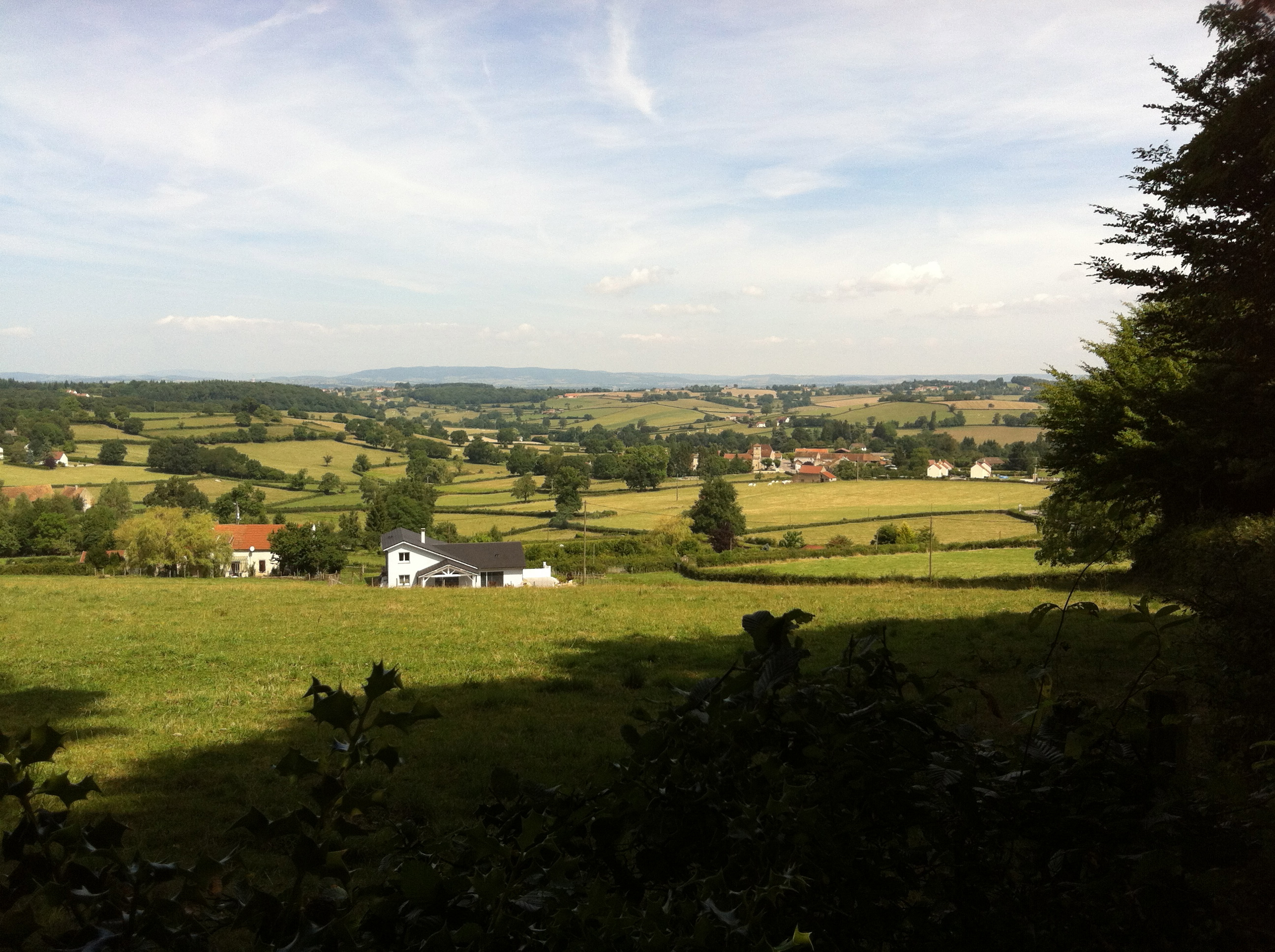 Saint-Romain-sous-Gourdon vu du lieu-dit le Paradis